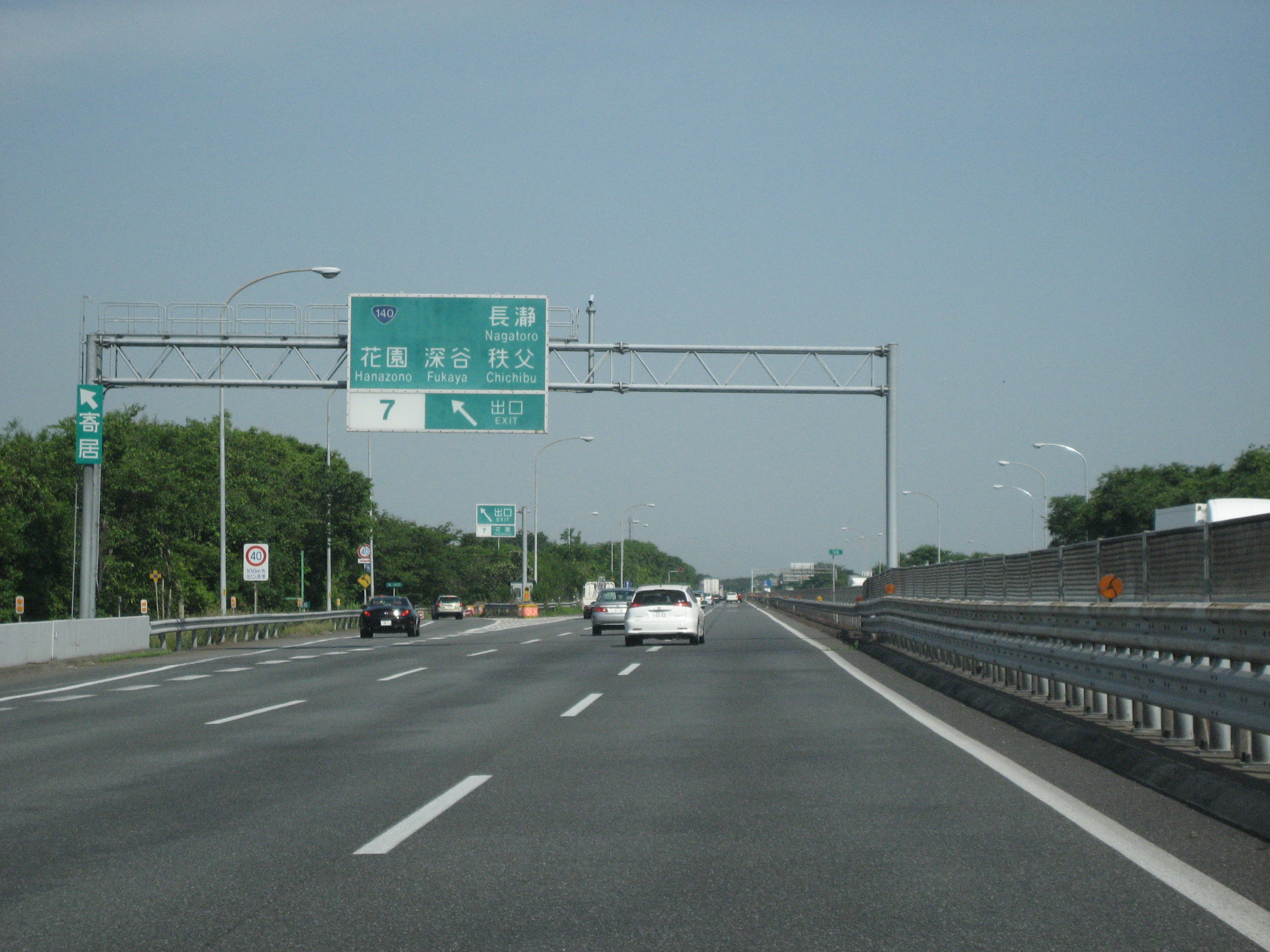 関越自動車道花園インターチェンジ（下り）